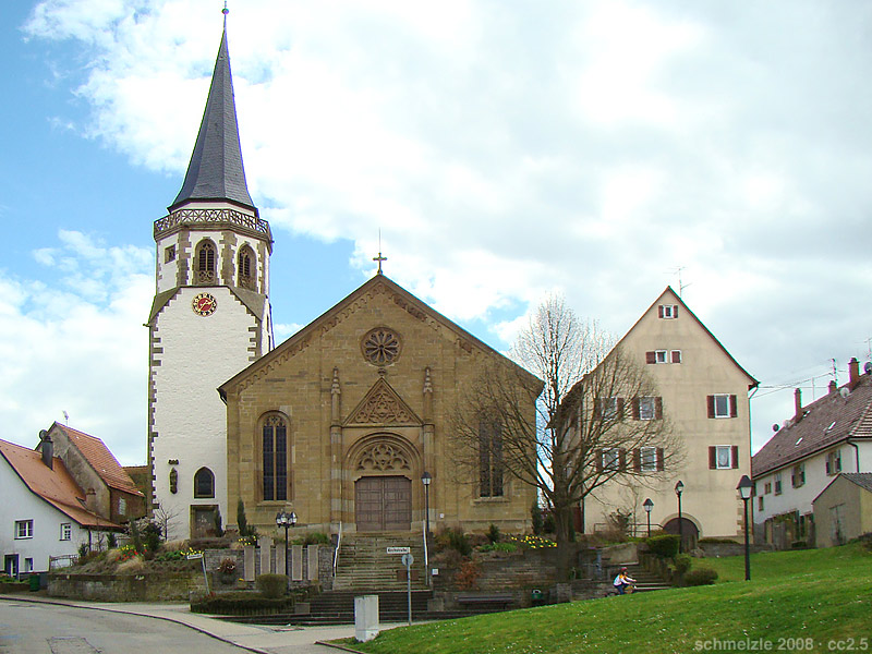 Ev. Pfarrkirche St. Gregor in Neckarwestheim, erbaut unter Beibehaltung eines älteren Turmes 1844